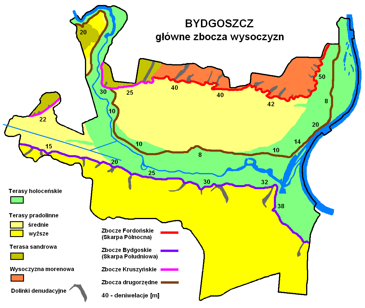 Schemat głównych zboczy teras i wysoczyzn w Bydgoszczy - na podstawie "Środowisko przyrodnicze Bydgoszczy, red. J. Banaszak, 1996"